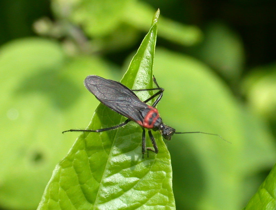 Reduvius humeralis：クビアカサシガメ 2008/06/01 和歌山県田辺市：Tanabe City. Wakayama Pref. Japan